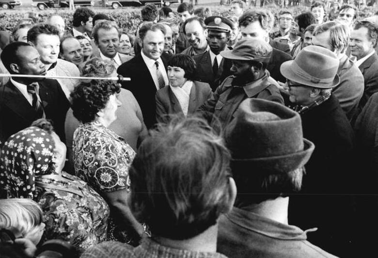 LPG Lützen, Samora Machel mit Erich Honecker ADN-ZB Gahlbeck eb-19.9.80 Bez. Halle: Herzliche Gespräche führten Samora Moises Machel, Präsident der Frelimo-Partei und der VR Moeambique, und Erich Honecker, Generalsekretär des ZK der SED und Vorsitzender des Staatsrates der DDR, mit Genossenschaftsbauern der LPG Lützen - hier auf einem Rübenschlag.